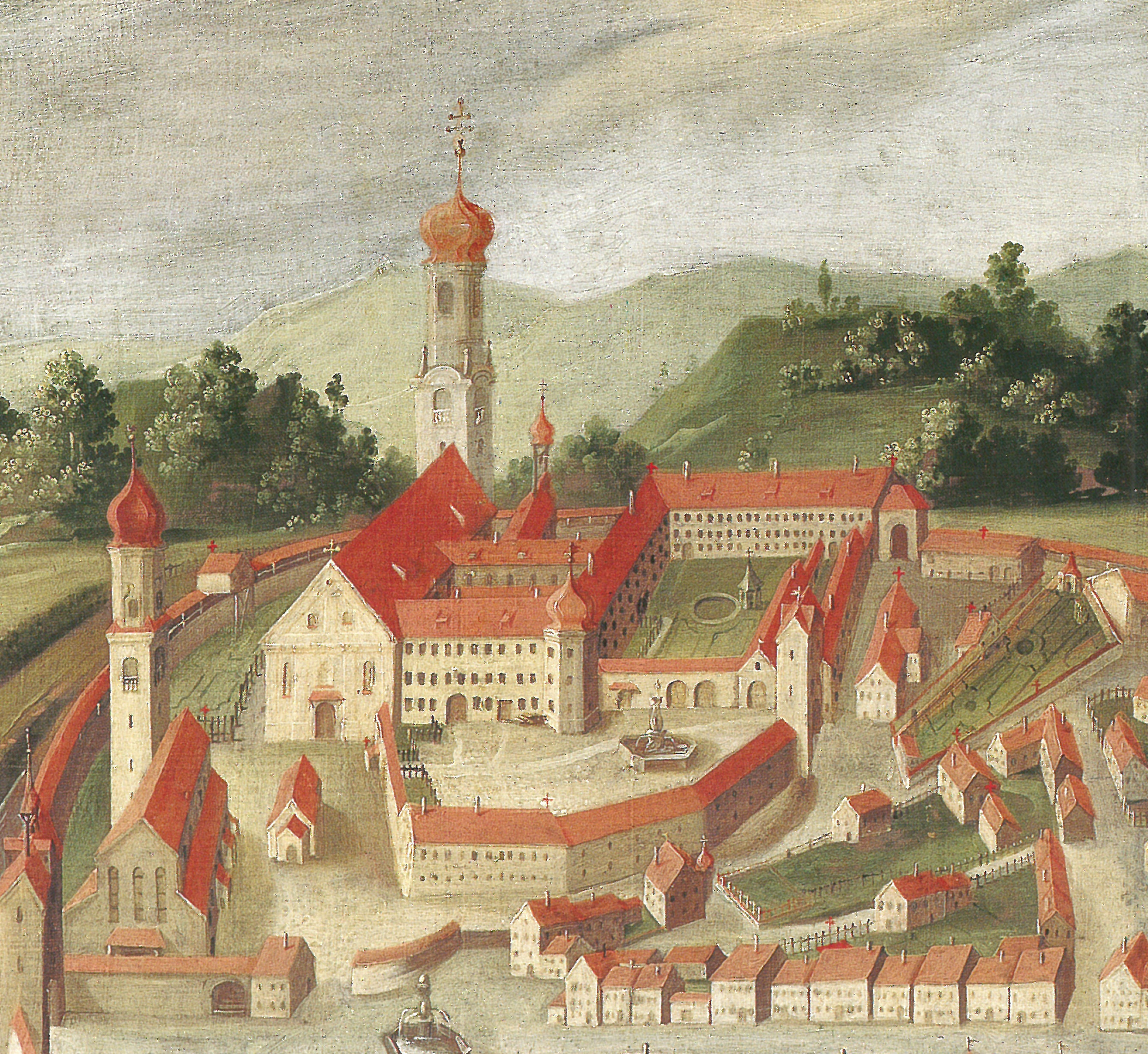 Isny im Allgäu, Stadtansicht von 1737 (Städtische Museen Isny) Klosterbezirk St. Georg (links die Nikolaikirche)